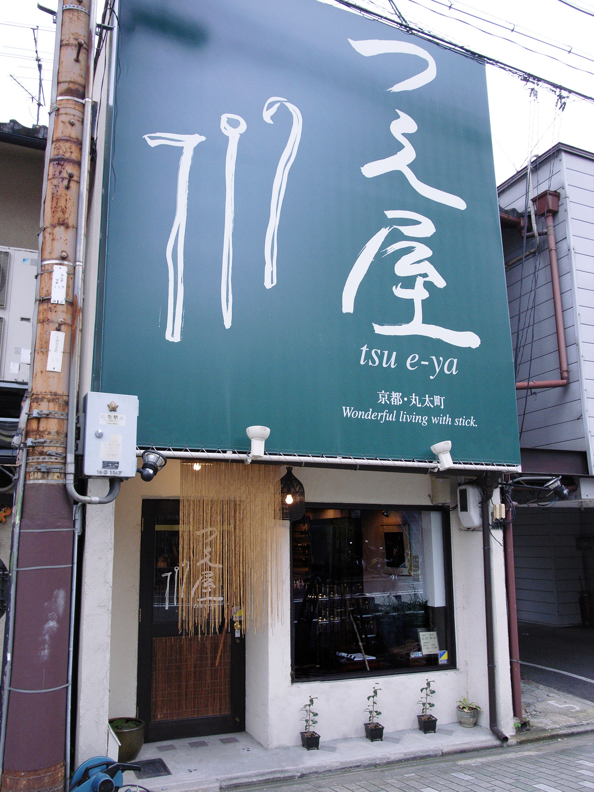 つえ屋 丸太町本店 京都市中京区丸太町通西洞院西入ル